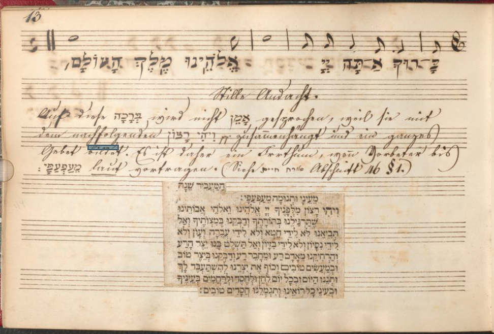 eine Seite aus Ms hebr oct 272 (Maḥzor zu Rosh ha-Shanah)